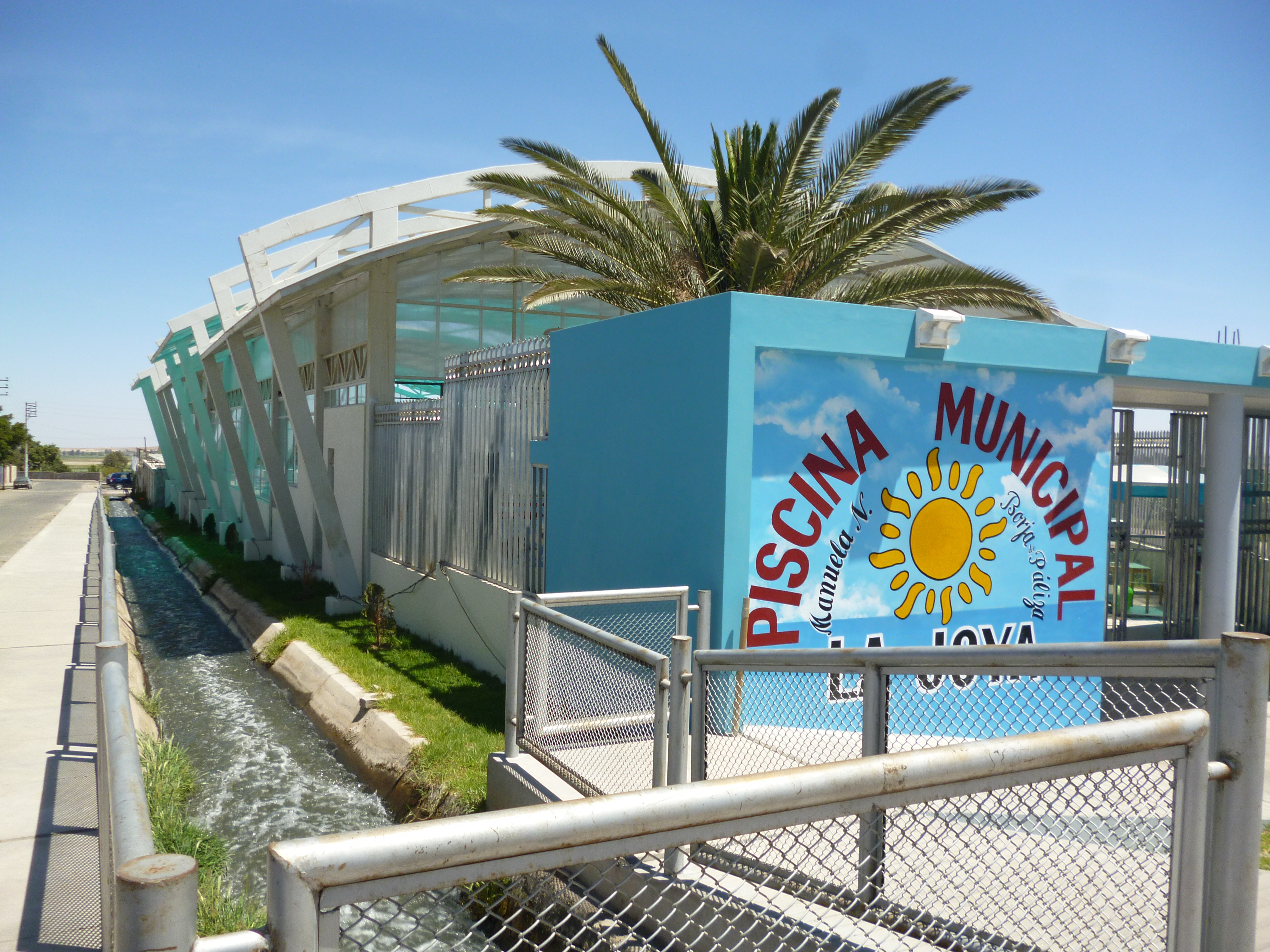 Vista de la Fachada de la Piscina Municipal de La Joya